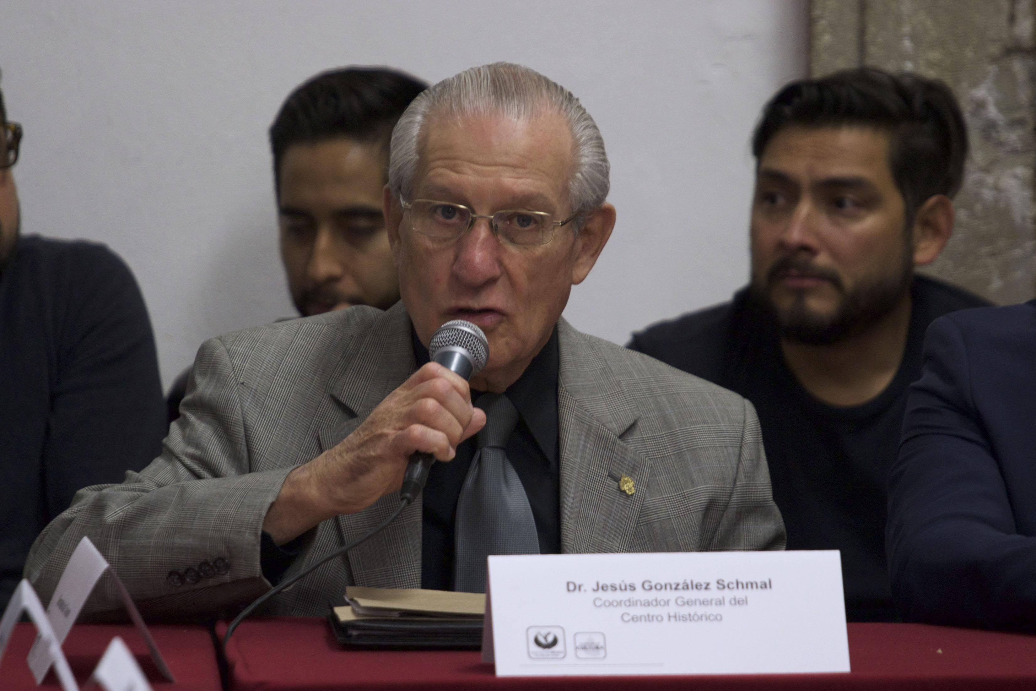 Miércoles 19 de abril de 2017.En el Antiguo Colegio de San Ildefonso, se realizó la instalación del Comité Organizador de la Celebración de Día de Muertos 2017, encabezada por Eduardo Vázquez Martín, secretario de Cultura de la Ciudad de México; además de los secretarios de Protección Civil, Fausto Lugo y de Turismo, Armando López Cárdenas; Jesús González Schmal, coordinador General la Autoridad del Centro Histórico, María de Lourdes Berho, directora General del Consejo de Promoción Turística de México; Nathan Poplawsky Berry, vicepresidente de Turismo de la CANACO; Mauricio Gómez Morín, artista visual y representantes de las instituciones participantes como los Faros, universidades e iniciativa privada.Fotografía; Milton Martínez / Secretaría de Cultura CDMX